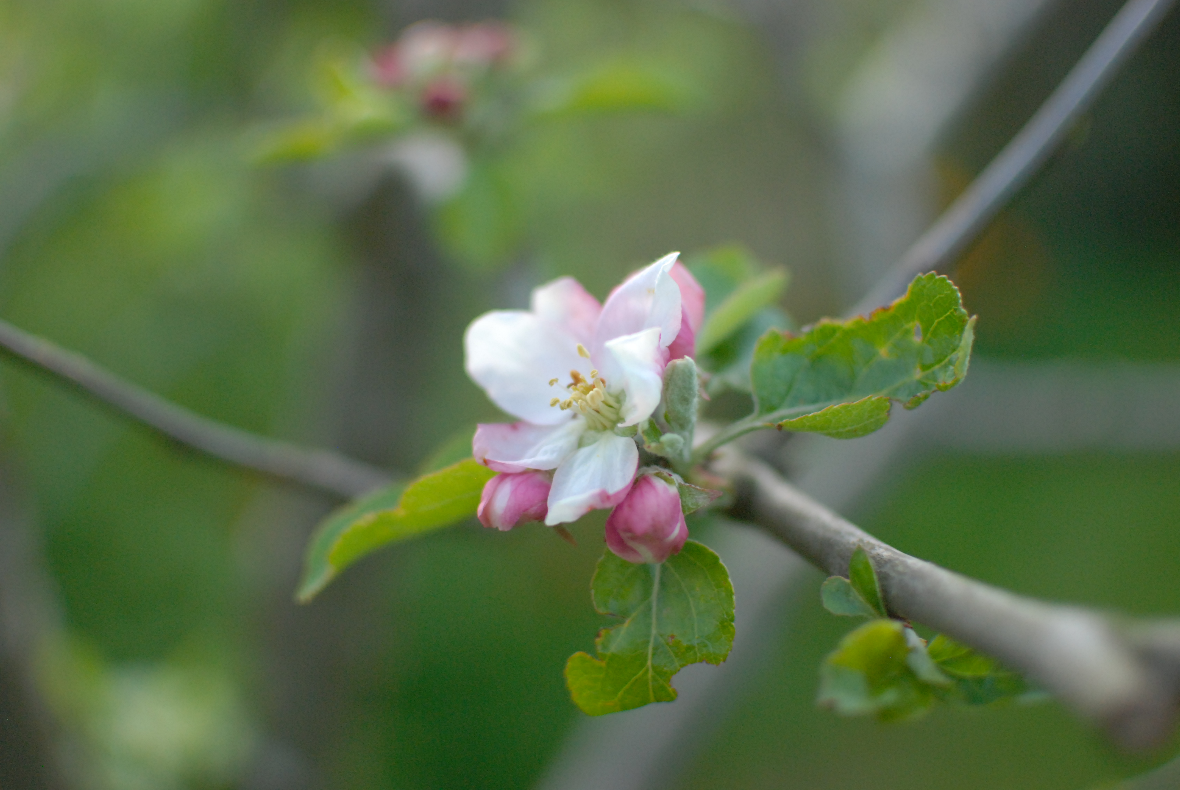 Fleur de pommier reine des reinettes, Ottignies, Belgium